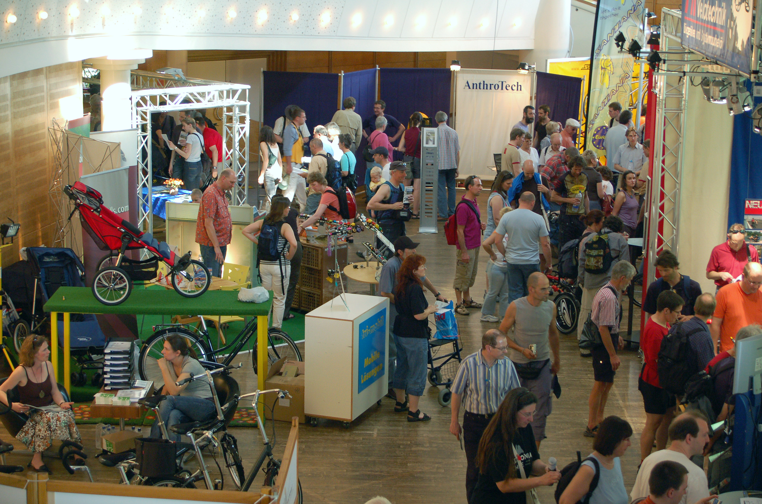 Spezialradmesse 2007, Eindruck aus Halle 1